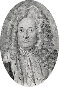 Gustaf Cronhielm (1664-1737)